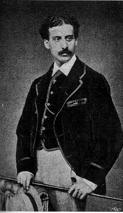 Max Liebermann im Alter von 25 Jahren als Student der Weimarer Malerschule